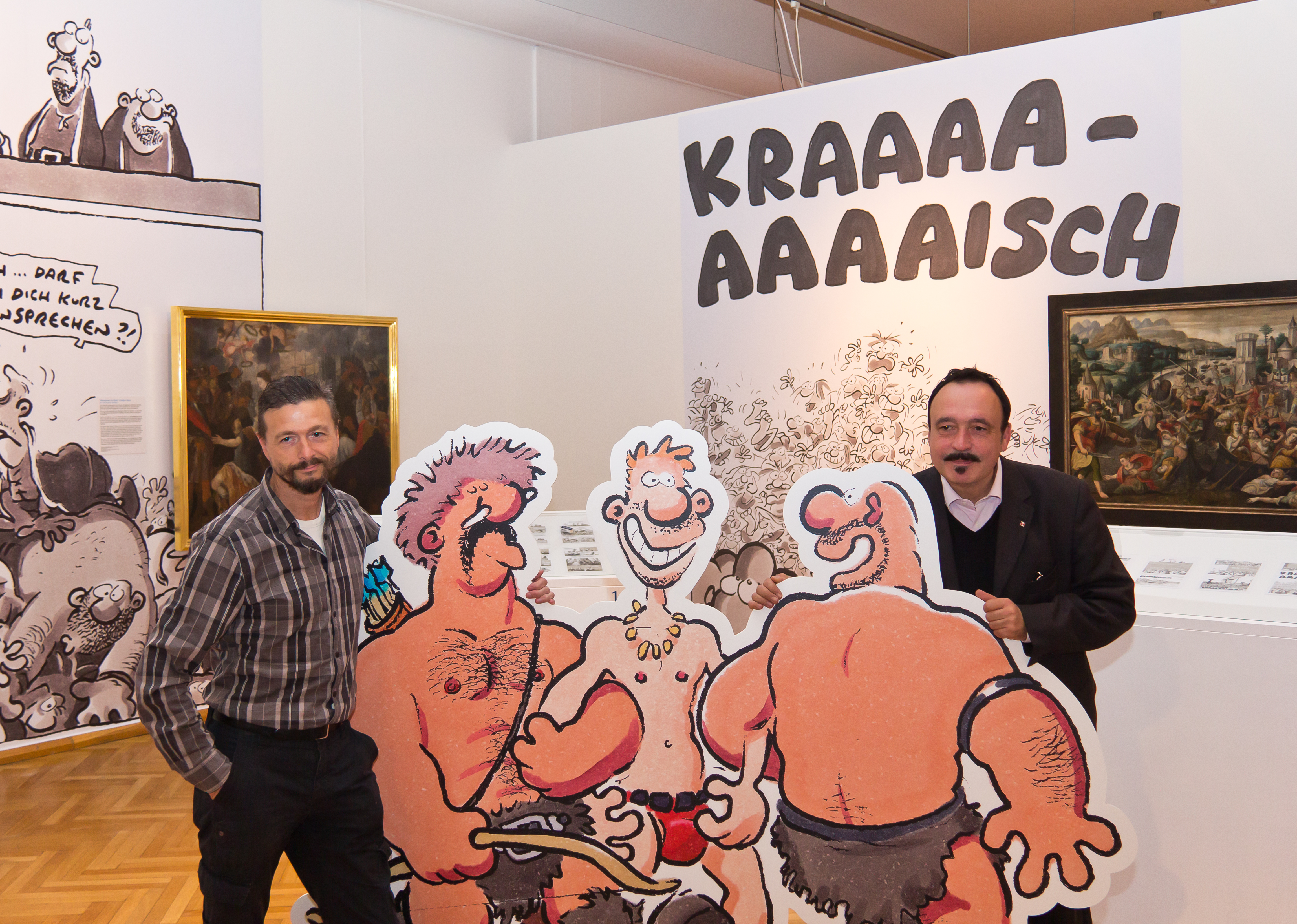 Pressegespräch zur Ausstellung im Kölnischen Stadtmuseum: „Ralf König: Das Ursula-Projekt. Elftausend Jungfrauen“ Foto: Ralf König und Museumsdirektor Mario Kramp